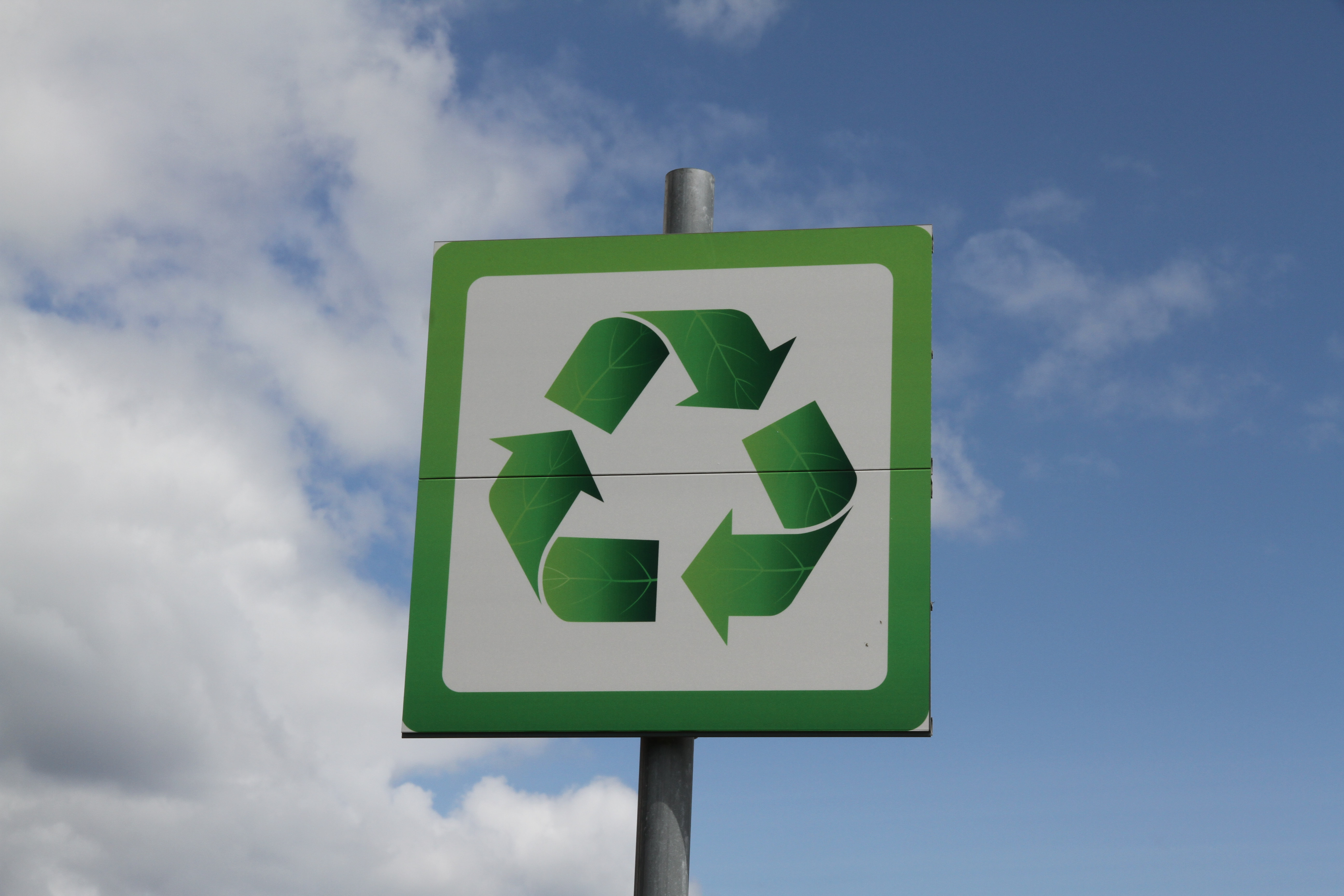 Schild mit Recycling-Symbol in Nogersund, Sölvesborg